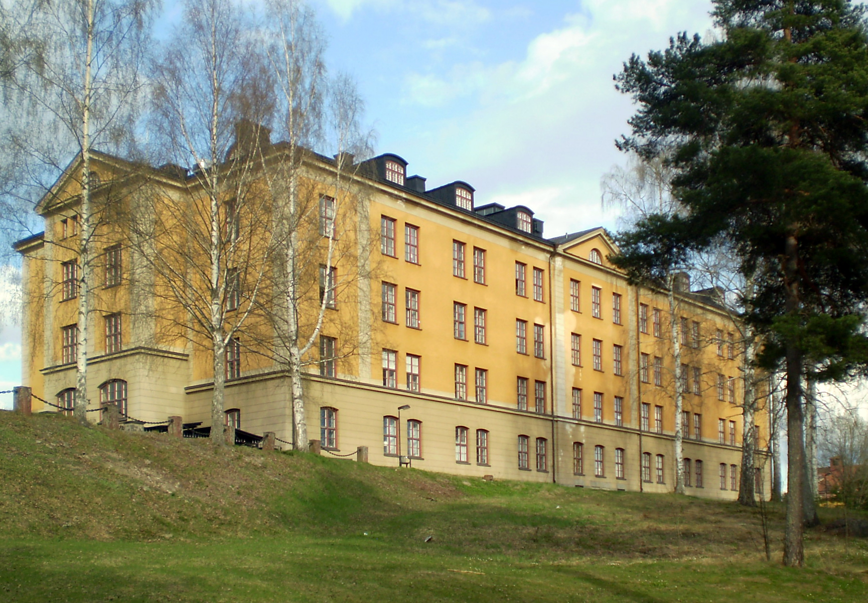 Vy över framsidan av kasern B vid Dalregementet i Falun